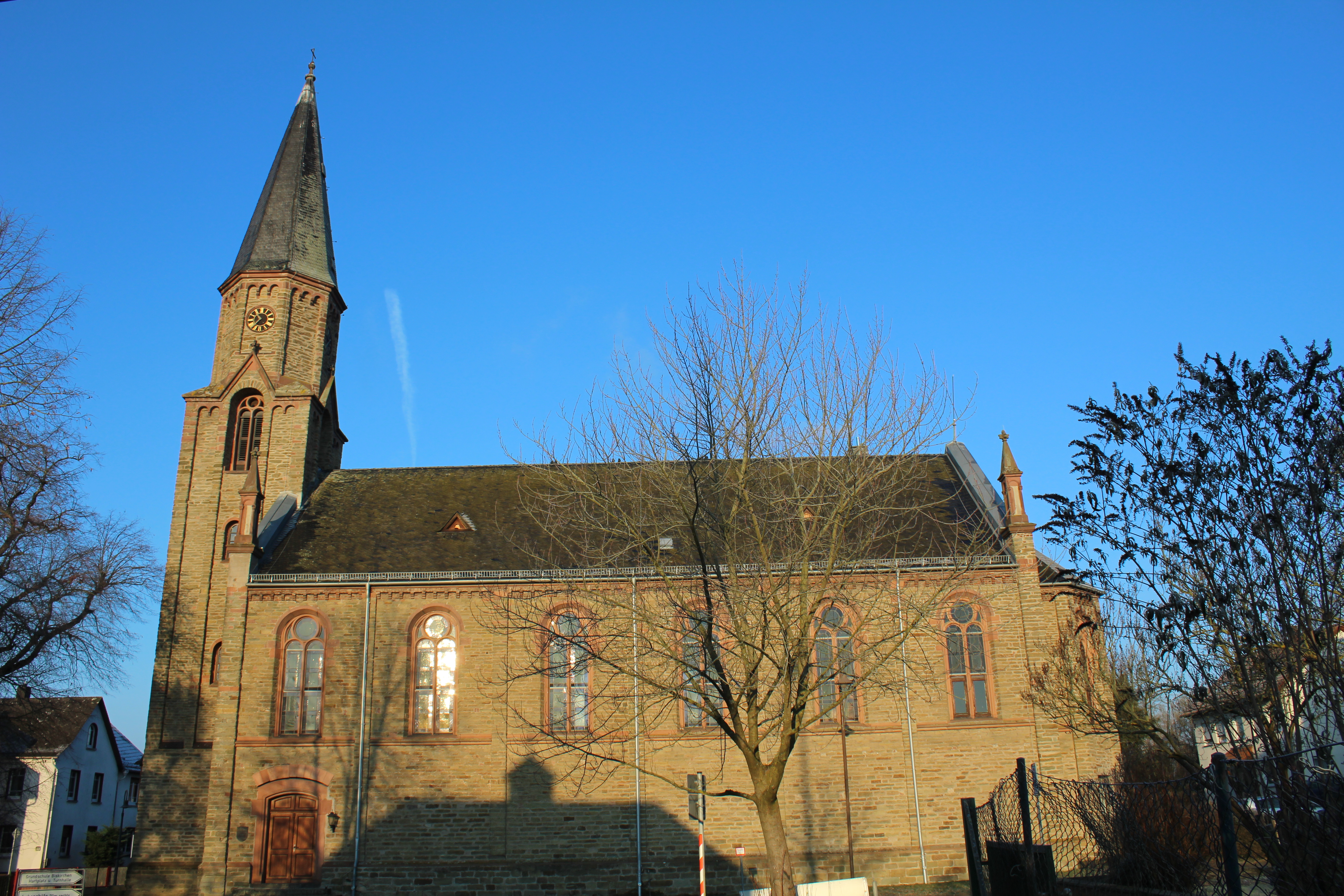 Evangelische Kirche Biskirchen, Gemeinde Leun, Lahn-Dill-Kreis, Hessen, Deutschland